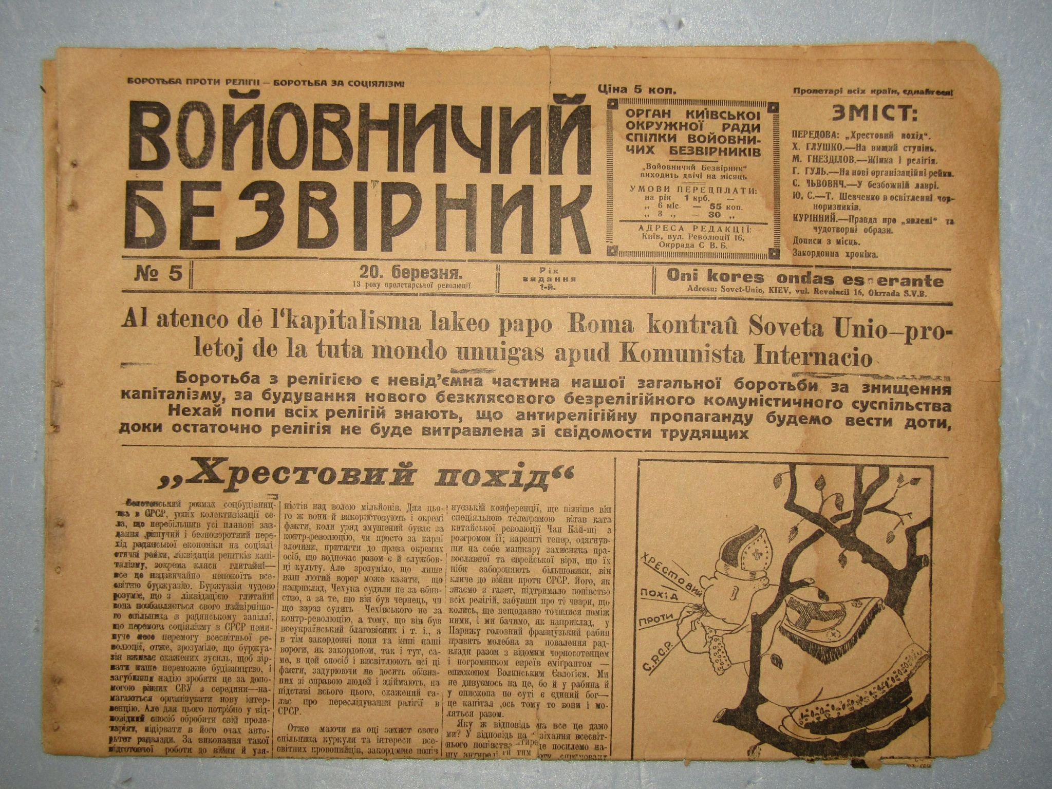 Газета Войовничий безвірник (Воинствующий безбожник) №5, 20 марта 13 года революции (1929)